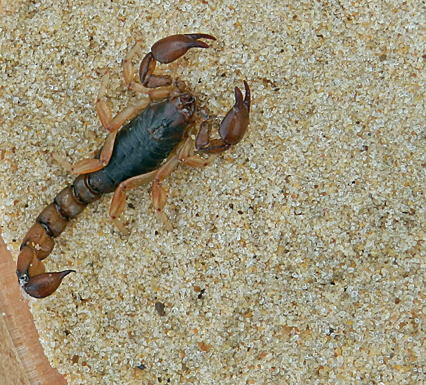 Recolectado en Rosario, Santa Fe, Argentina